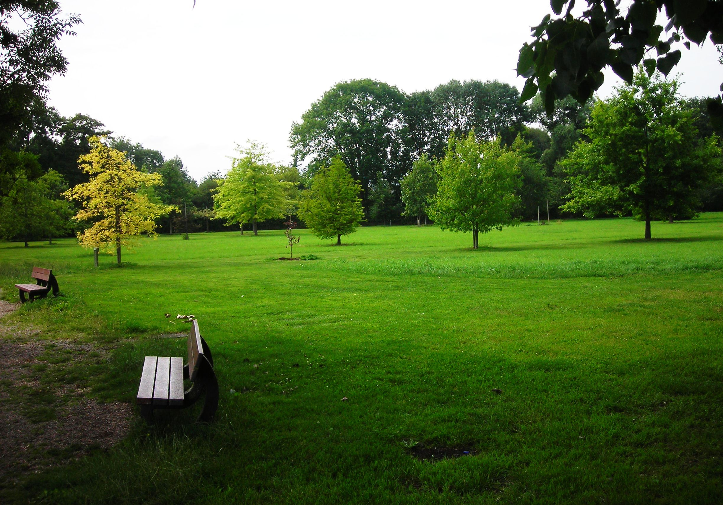 Arboretum Koutiala d’Alençon (Orne, France)